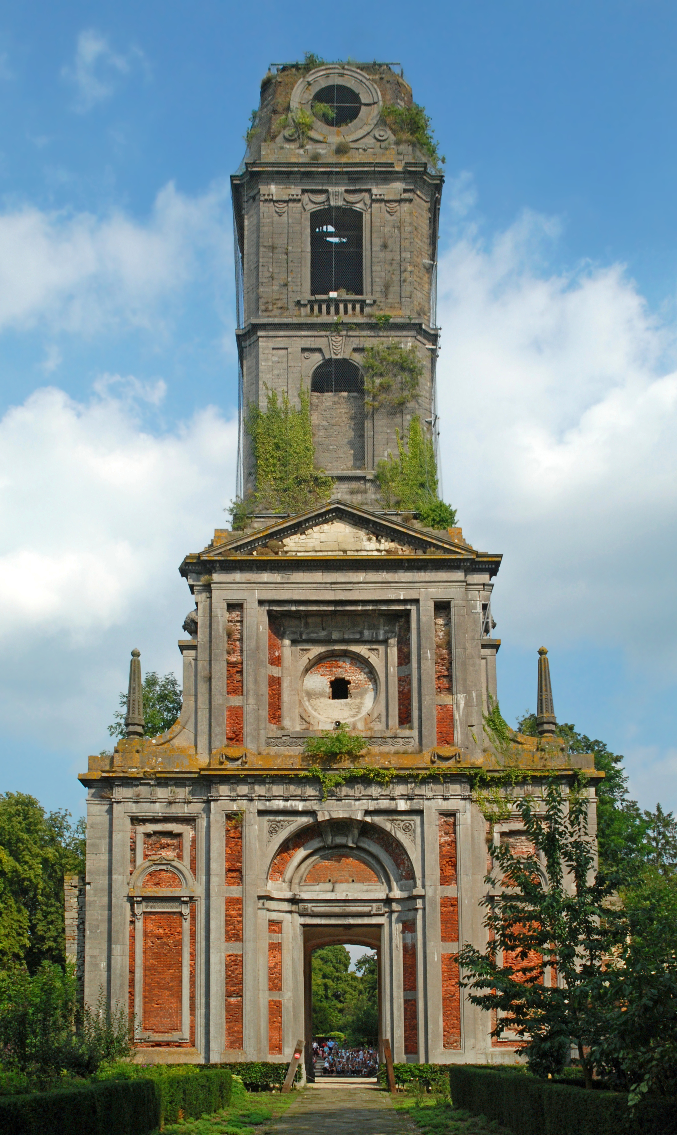 Belgique - Wallonie - Cambron-Casteau - Abbaye de Cambron